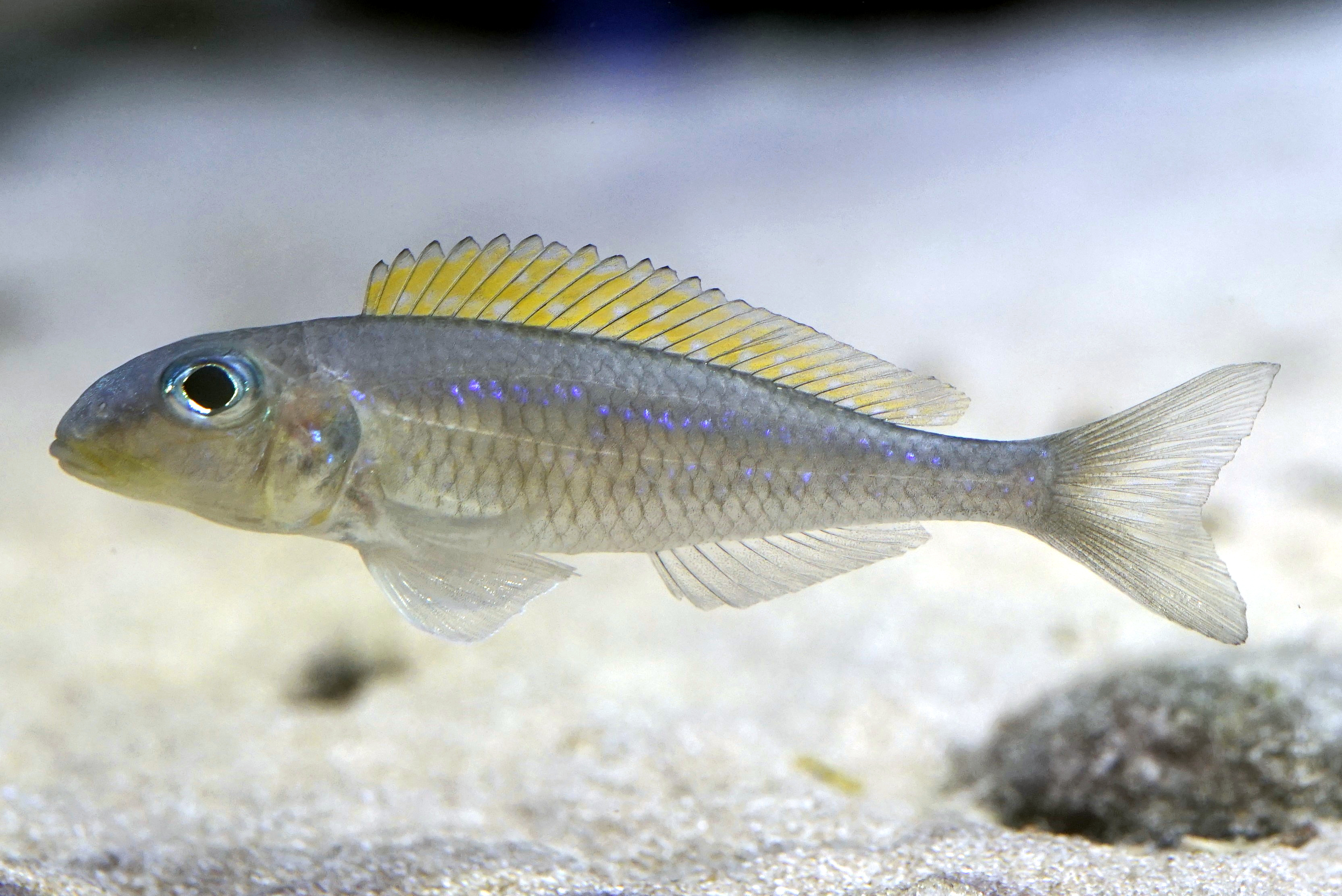 クセノティラピア・フラビピンニス Yellow sand cichlid Domain: Eukaryota • Regnum: Animalia • Phylum: Chordata • Subphylum: Vertebrata • Infraphylum: Gnathostomata • Superclassis: Osteichthyes • Classis: Actinopterygii • Ordo: Perciformes • Familia: Cichlidae • Genus: Xenotilapia Wikispecies has an entry on: Xenotilapia flavipinnis. Species Xenotilapia flavipinnis Poll, 1985 動物界 脊索動物門 条鰭綱 スズキ目 カワスズメ科 クセノティラピア属 Other photos: NCBI Taxonomy ID:240481 ITIS link: Xenotilapia flavipinnis Poll, 1985 (mirror) uBio search link: Xenotilapia flavipinnis